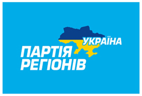 Емблема Партії Регіонів